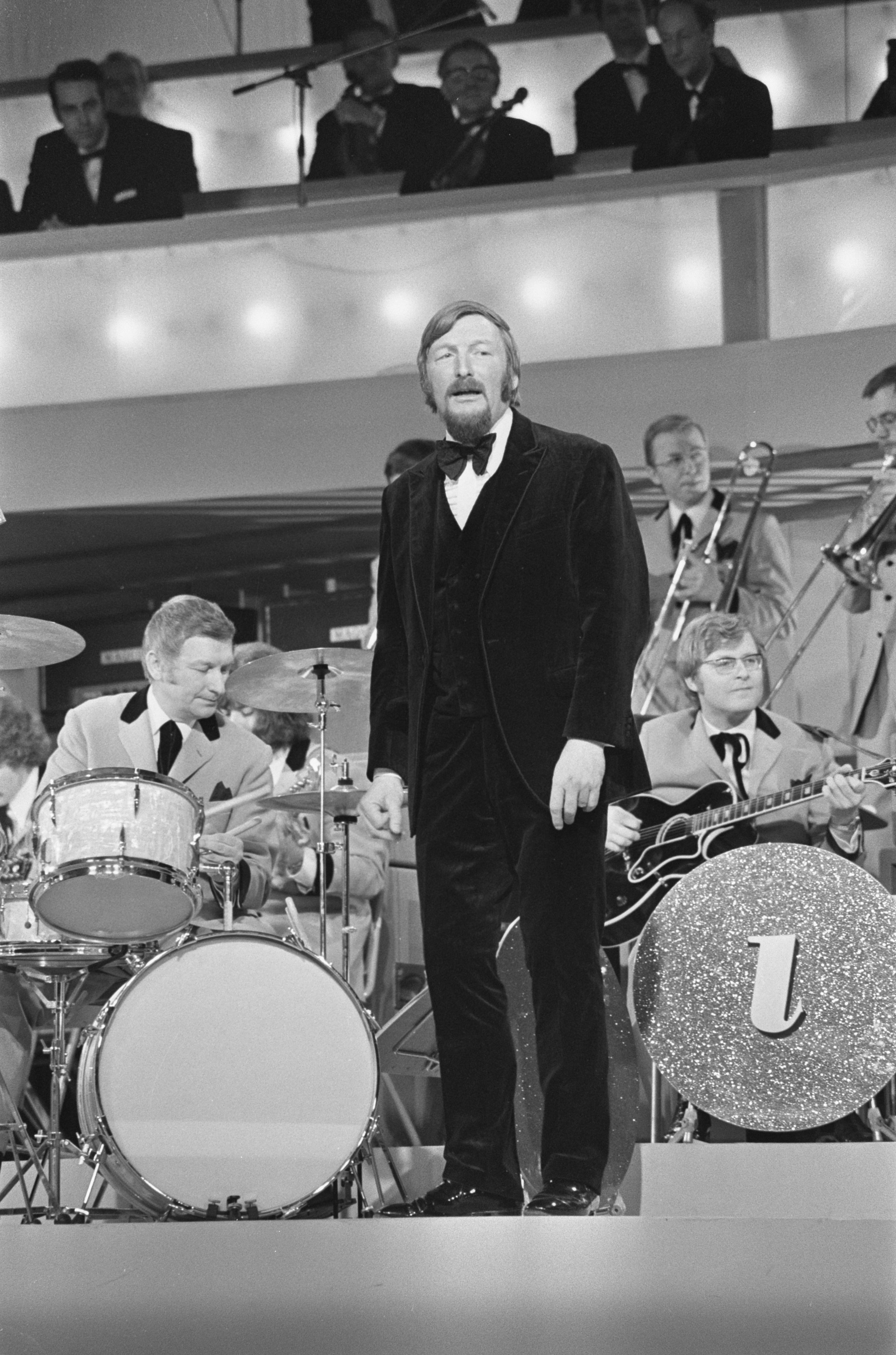 Collectie / Archief : Fotocollectie Anefo Reportage / Serie : [ onbekend ] Beschrijving : Grand Gala du Disque in RAI Amsterdam. James Last Band Datum : 27 februari 1970 Locatie : Amsterdam, Noord-Holland Instellingsnaam : RAI Fotograaf : Mieremet, Rob / Anefo Auteursrechthebbende : Nationaal Archief Materiaalsoort : Negatief (zwart/wit) Nummer archiefinventaris : bekijk toegang 2.24.01.05 Bestanddeelnummer : 923-3019